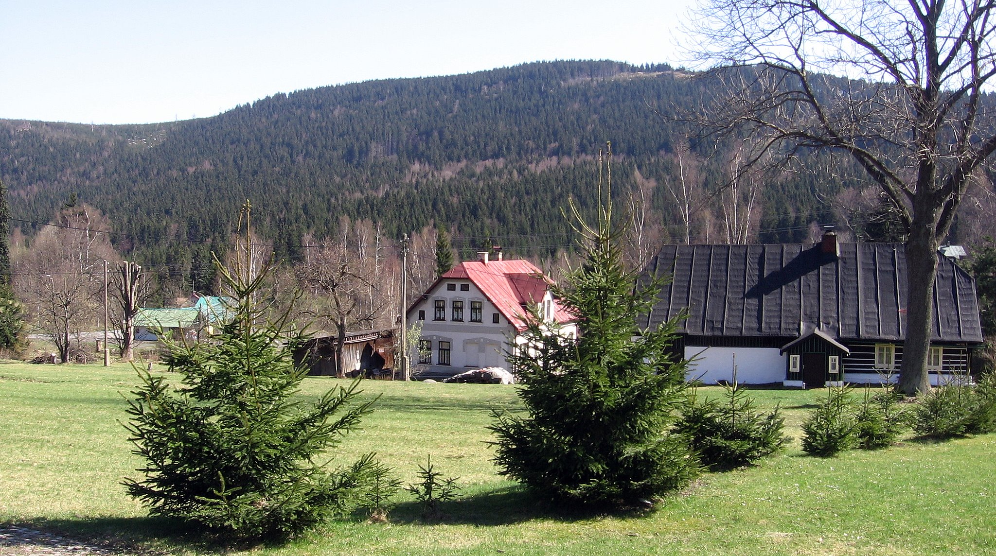 Kořenov (Czech Republic)